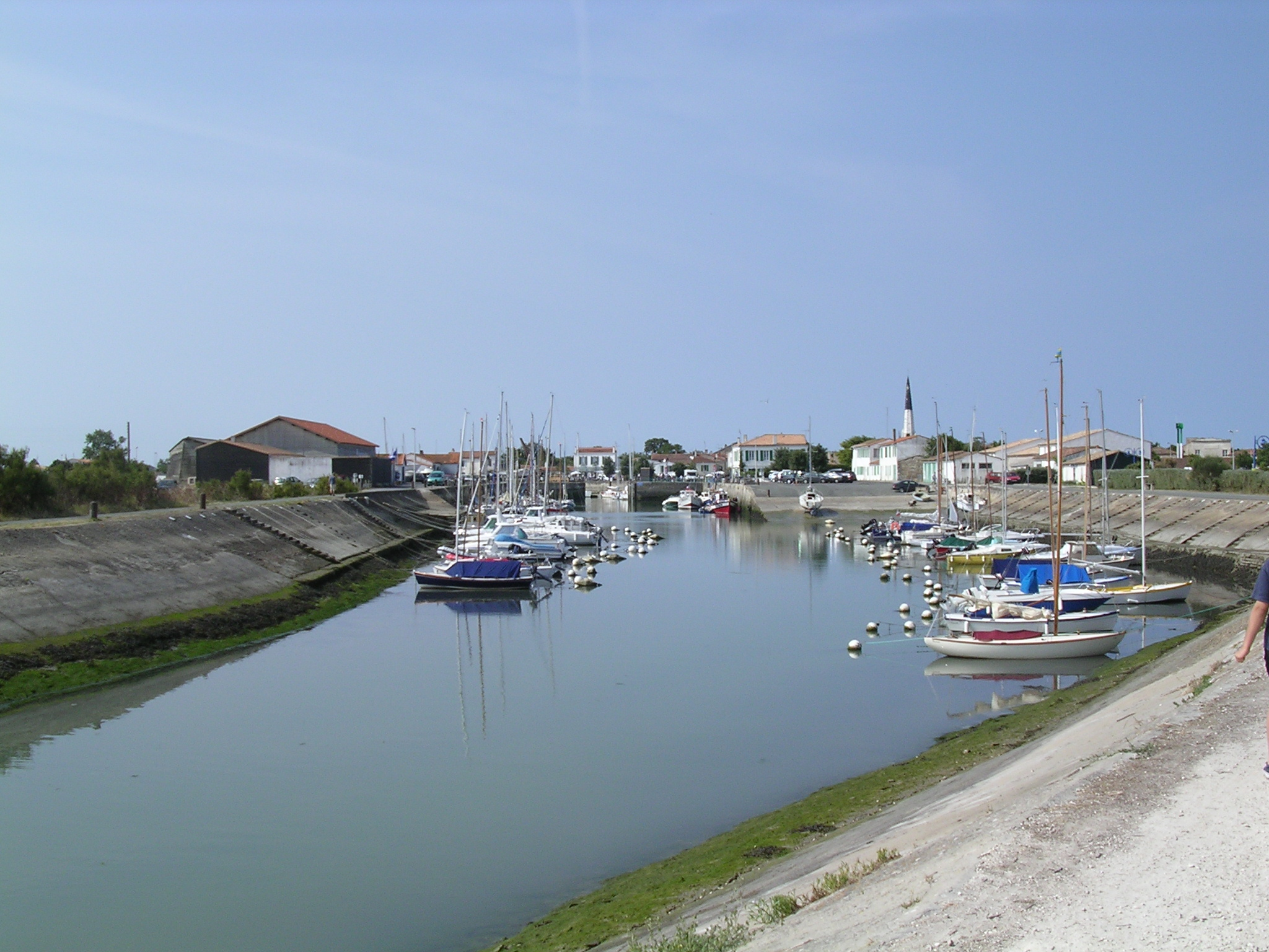 FRANCE Charente Maritime (17) Ars En Ré 01